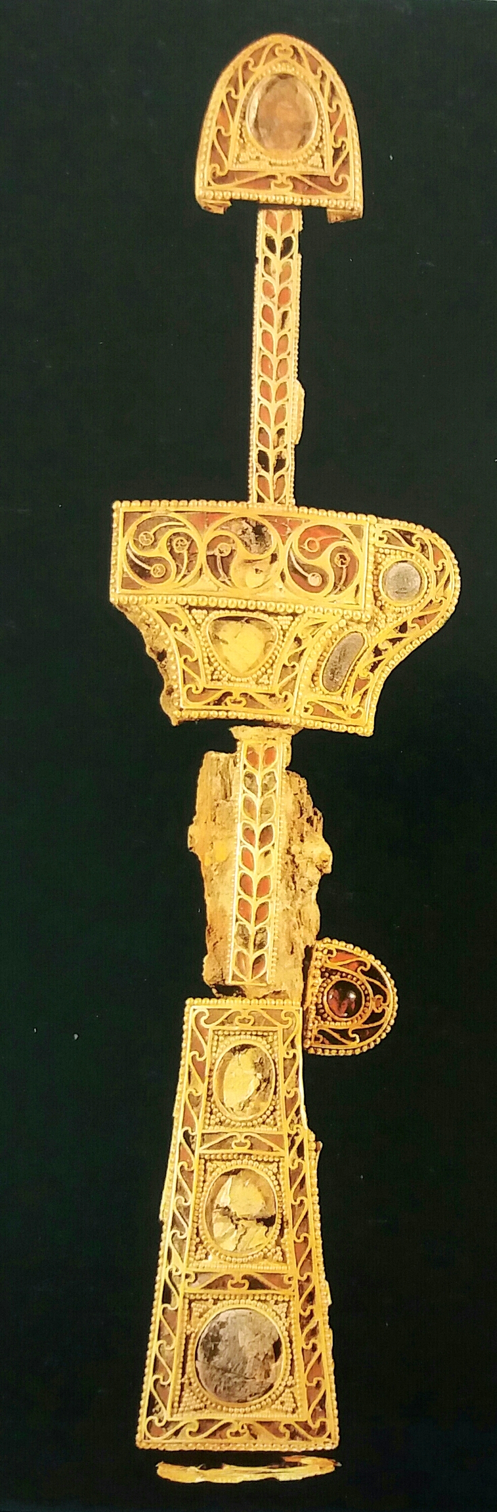 Ornamented Sword from Gyerim-ro Gyeongju